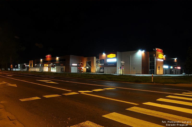 Największe centrum handlowe naszego regionu